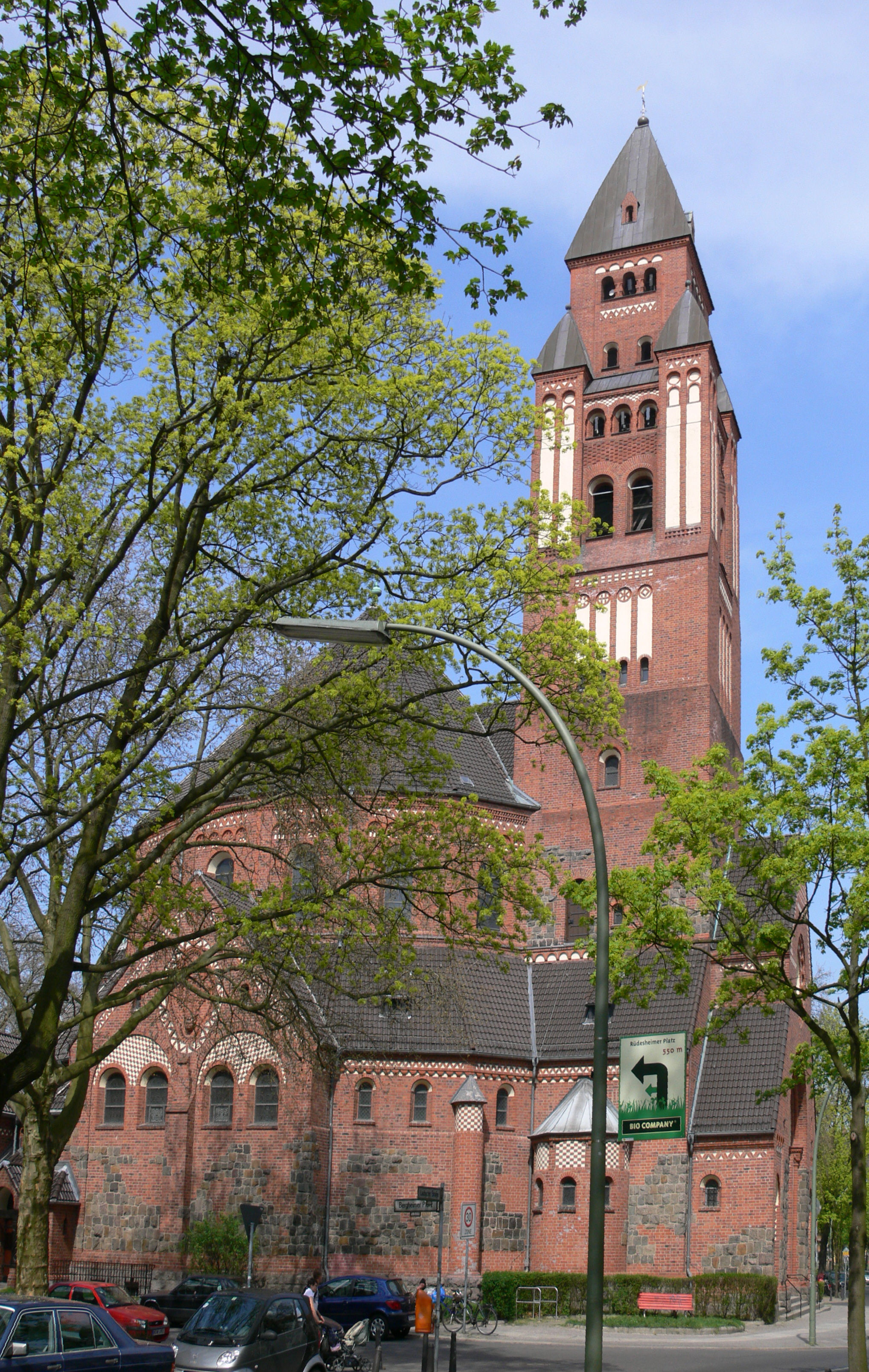 Berlin-Wilmersdorf, Bergheimer Platz, Katholische Kirche St. Maria von der Unbefleckten Empfängnis